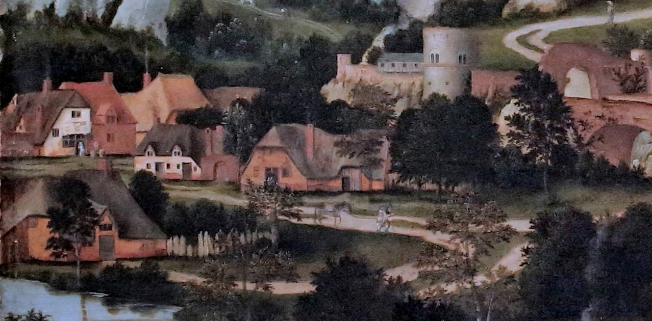 Joachim Patinier (1480-1524), Repos pendant la fuite en Egypte, detail 3.